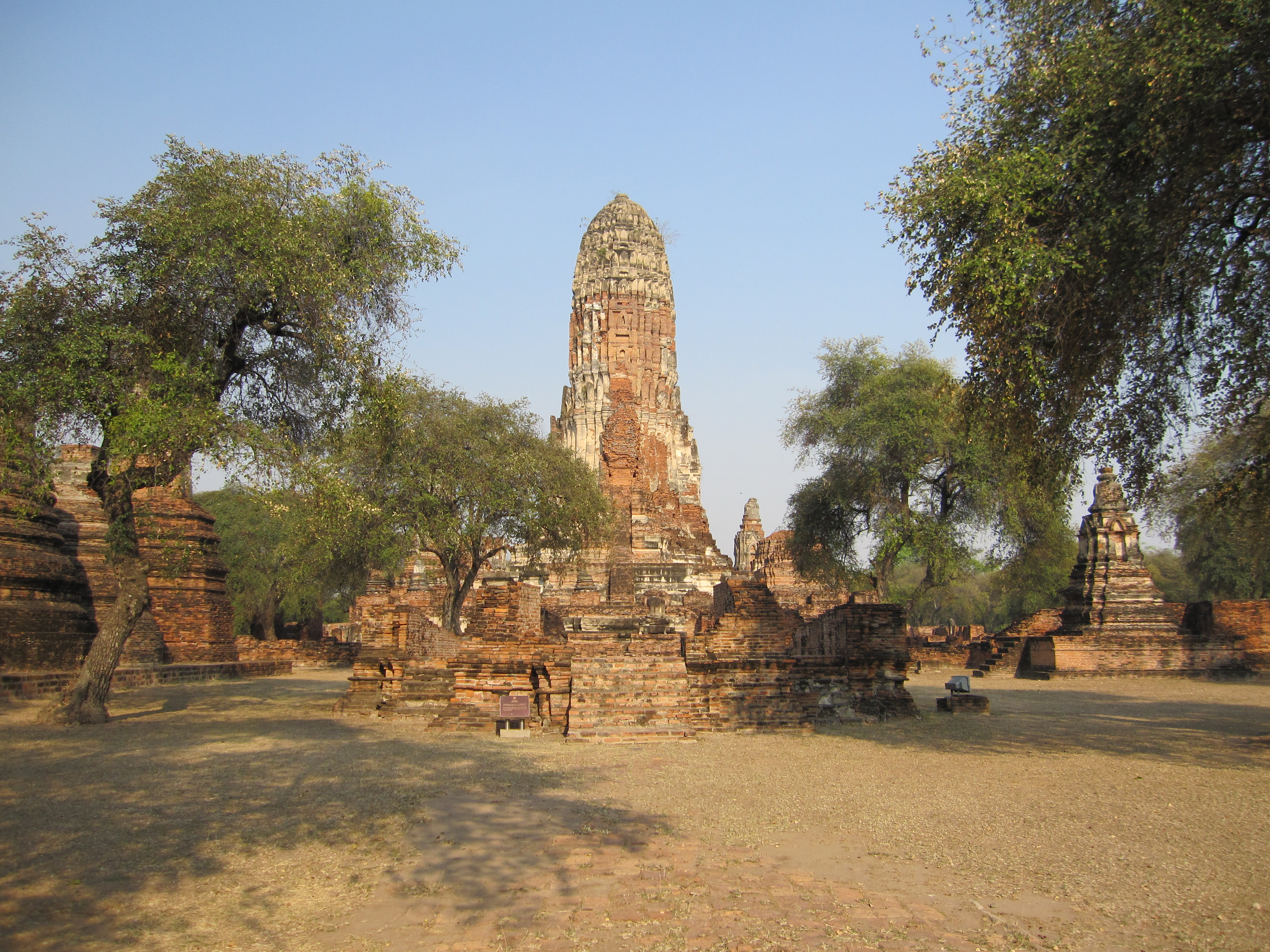 Wat Phra Ram